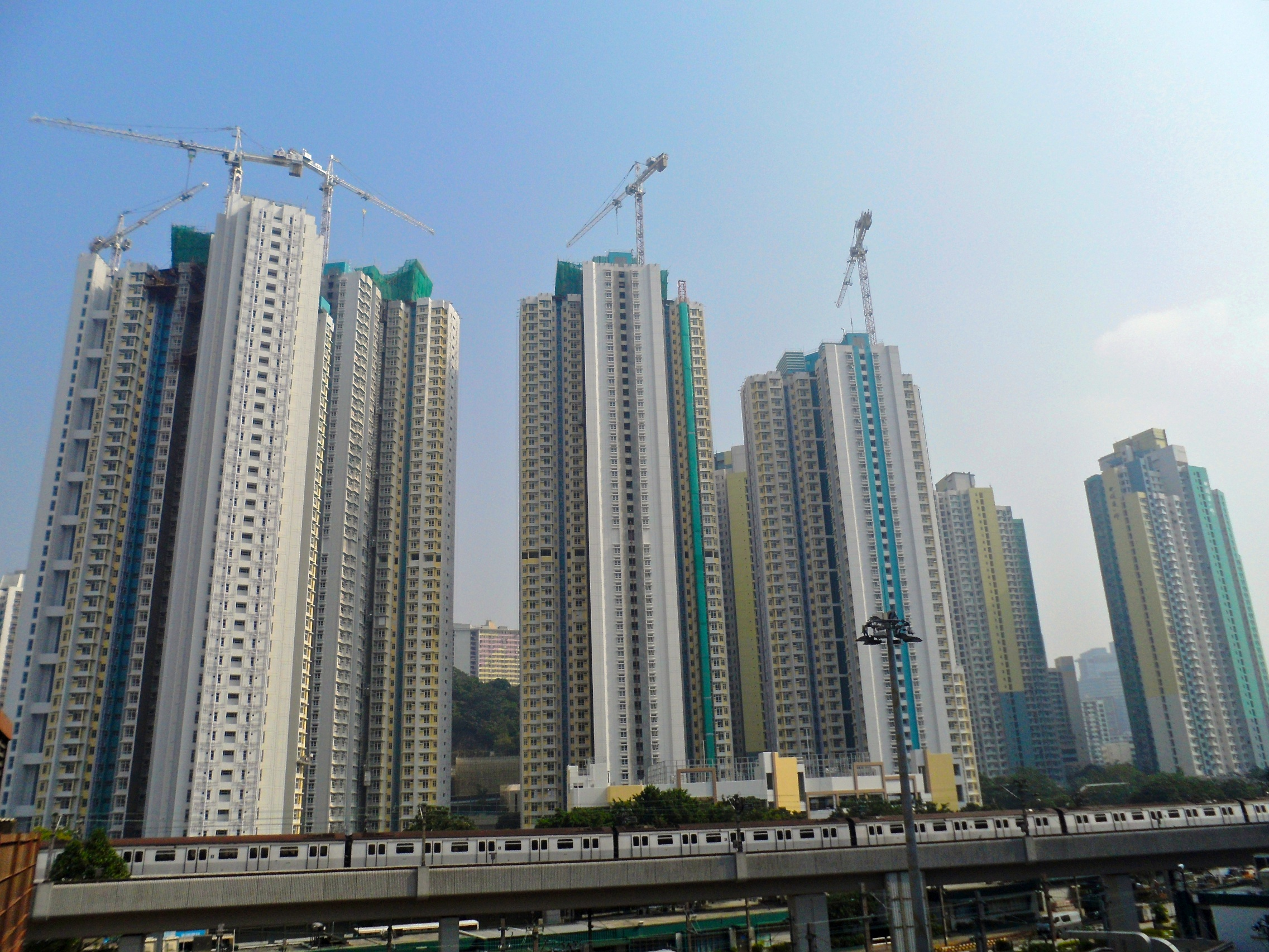 牛頭角下邨第一期樓宇，後方為牛頭角上邨